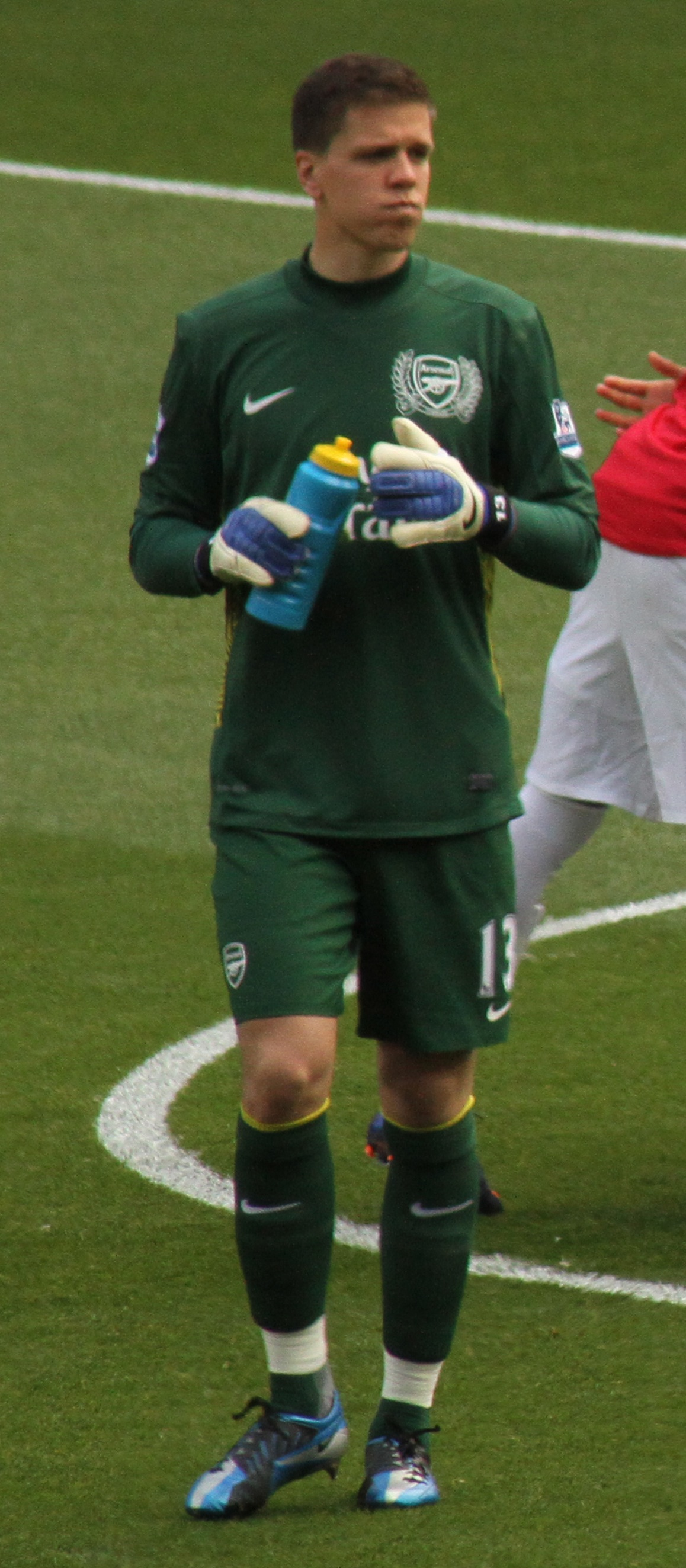 Войцех Щенсный